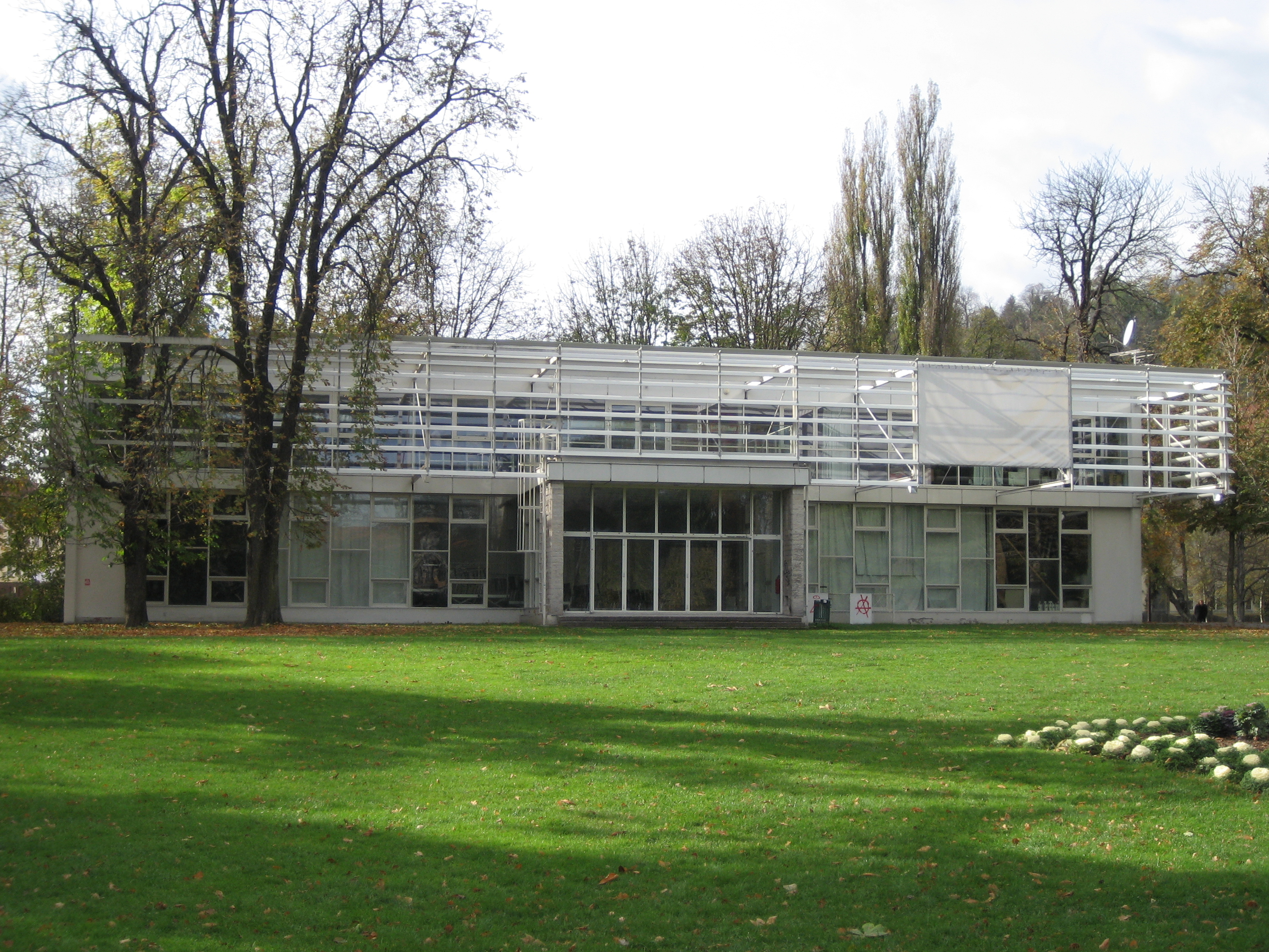 Forum Stadtpark in Graz (Austria)